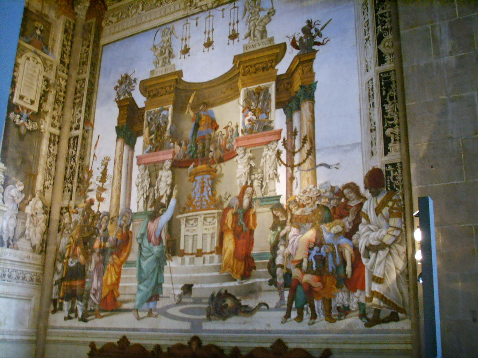 Santa Maria Novella church, capel of Flippo Strzzi, frescos by Filippino Lippi, in Florence, Italy